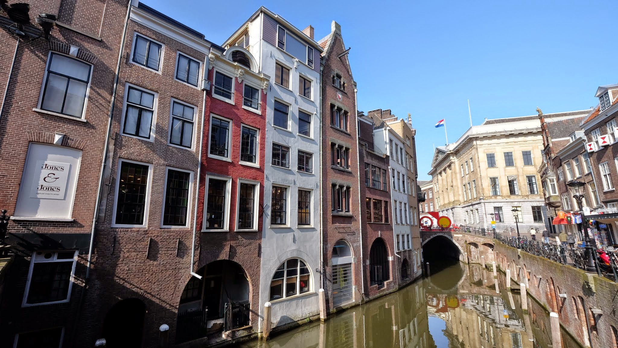 Lange Elisabethstraat Mariaplaats, 3511 Utrecht, Netherlands